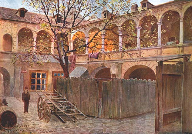 Nádvoří domu U zlatého stromu (Praha, Dlouhá třída)